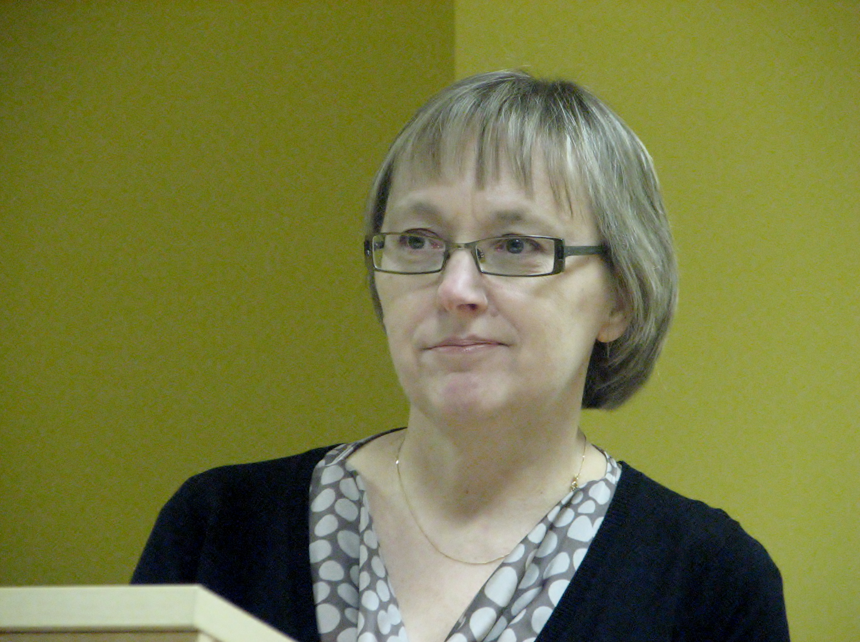 Maire Raadik ÕS 2013 esitlusel